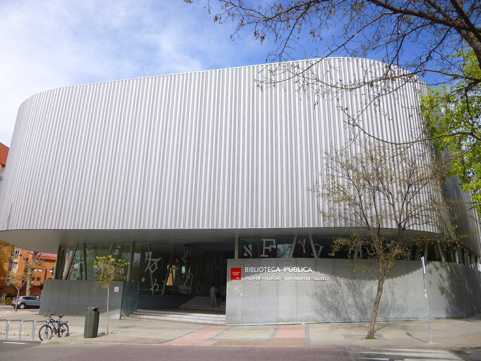 Biblioteca Pública Villa de Vallecas Luis Martín-Santos (Madrid)